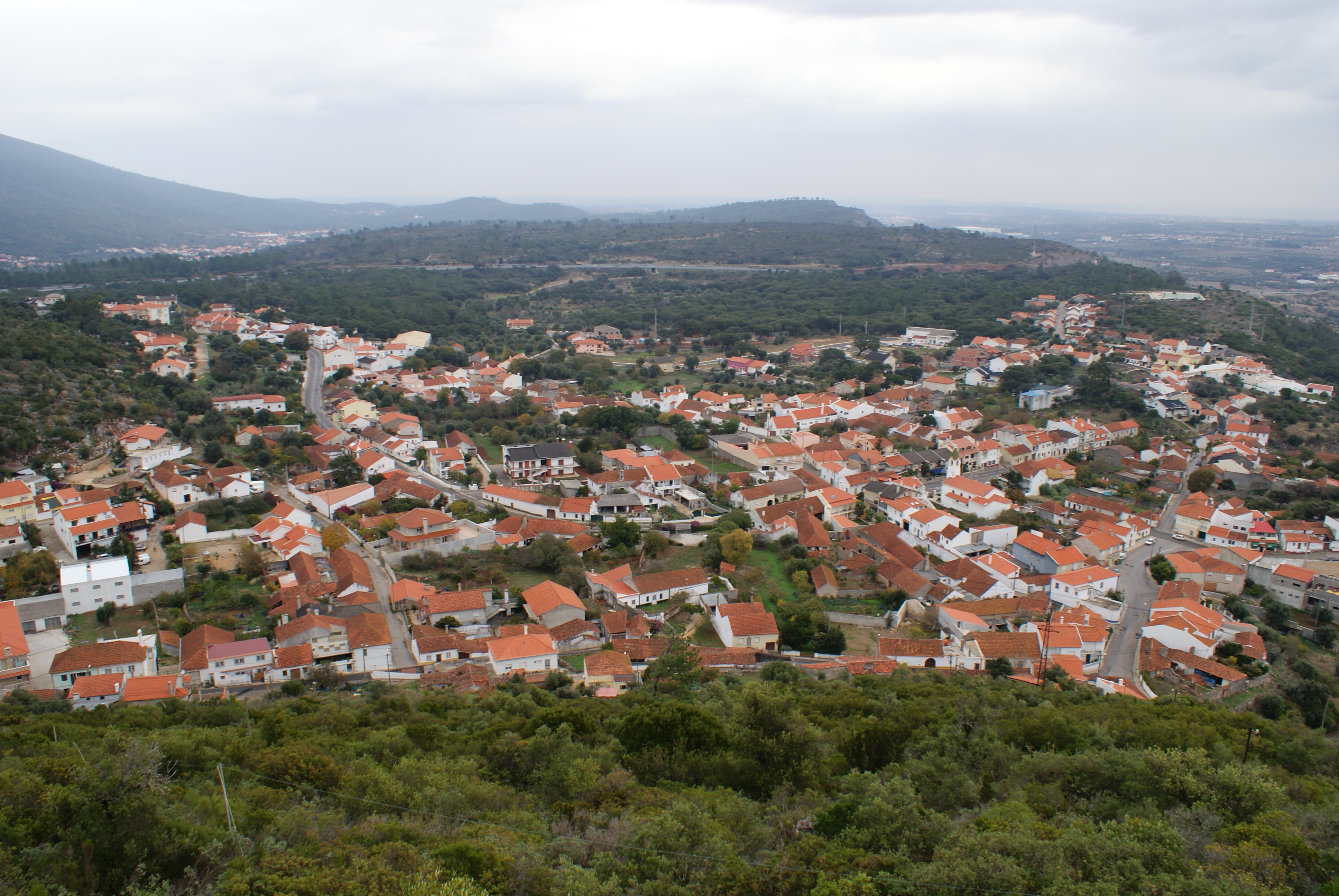 vista de Moitas Venda